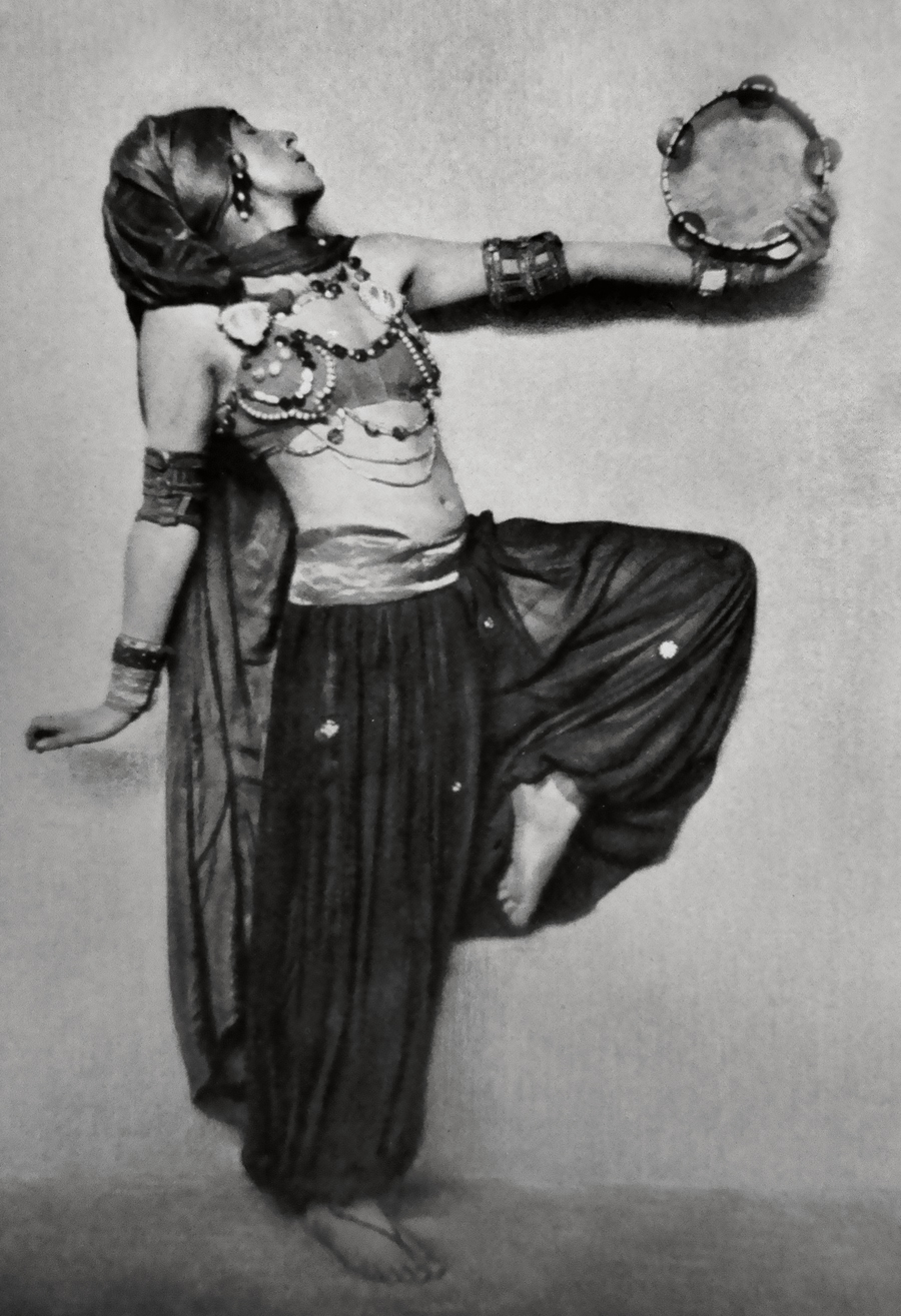 Portrait der Sent M'ahesa (d. i. Elsa von Carlberg). Foto von Hanns Holdt